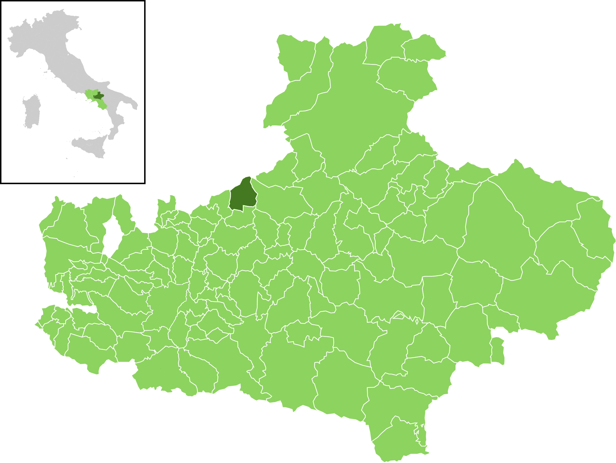 Posizione del comune all'interno della provincia di Avellino